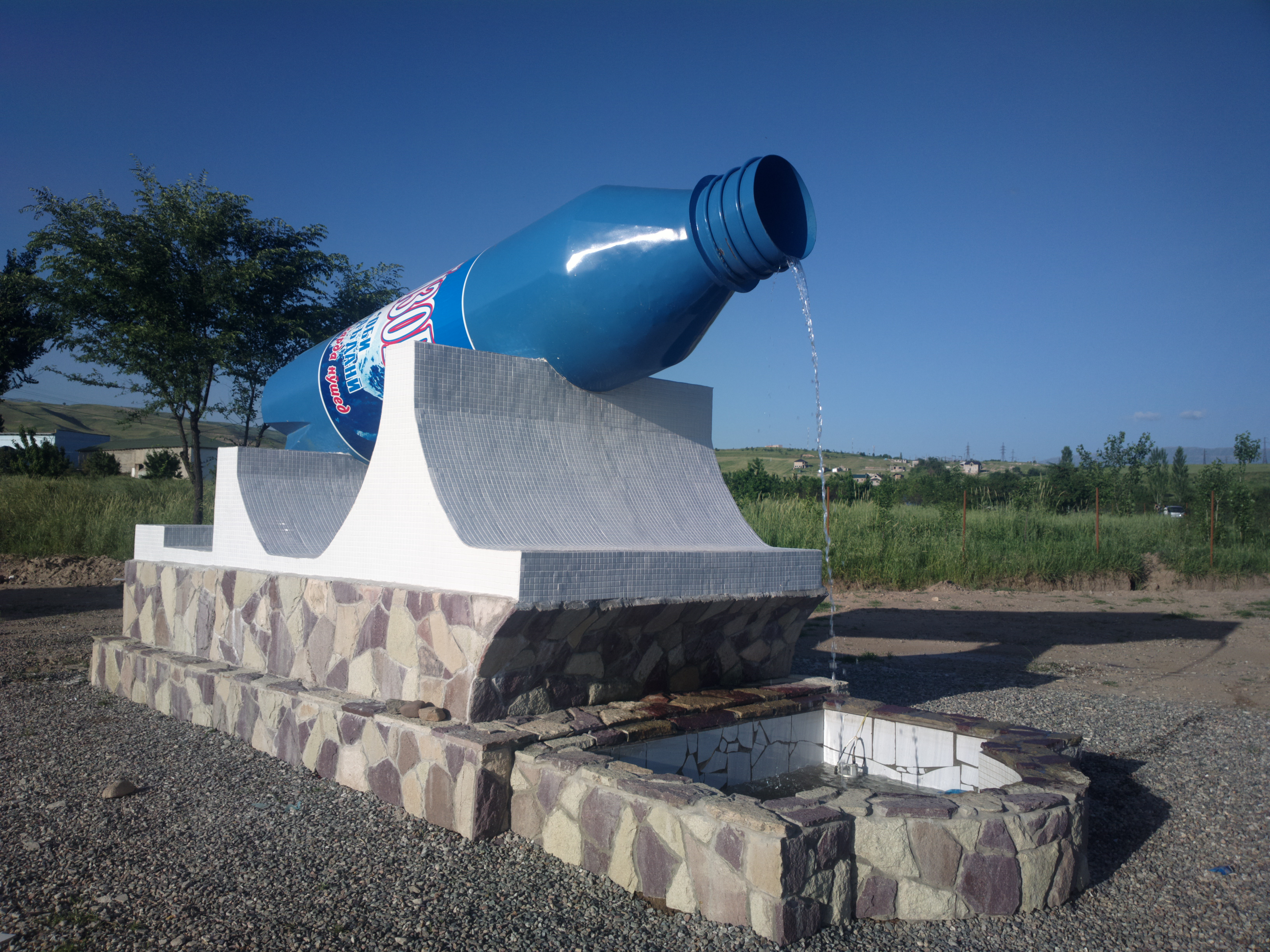 Тоҷикӣ: Чашмаи оби маъдании "Файзобод"